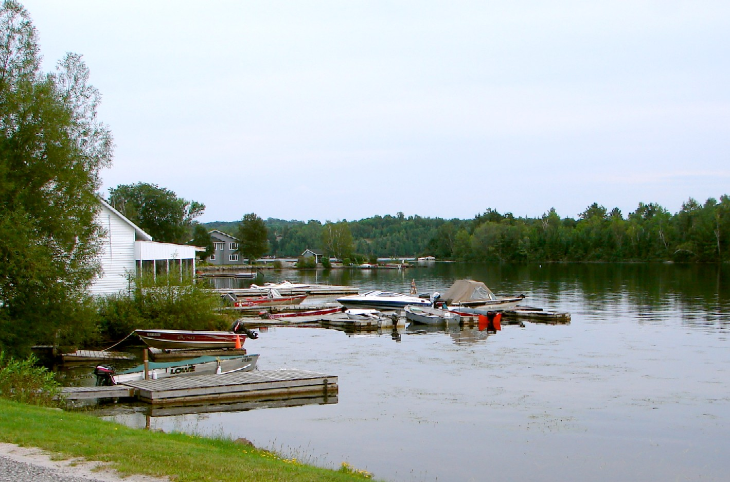 Port Loring, Ontario, Canada